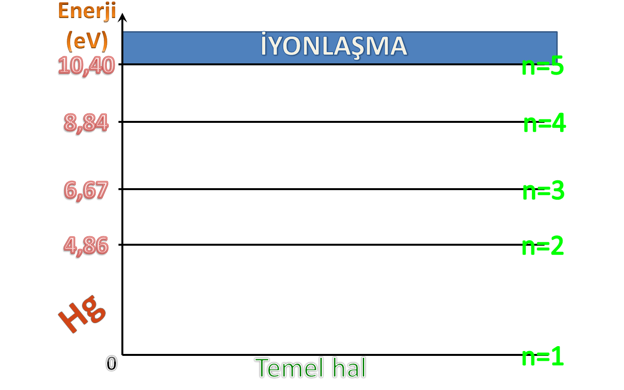 Cıva atomuna ait enerji seviyeleri